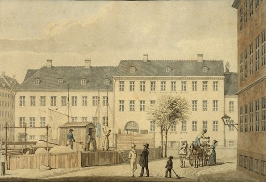 Sandkiste (sand deposit?) - at Frederiksholms Kanal in Copenhagen, Denmark